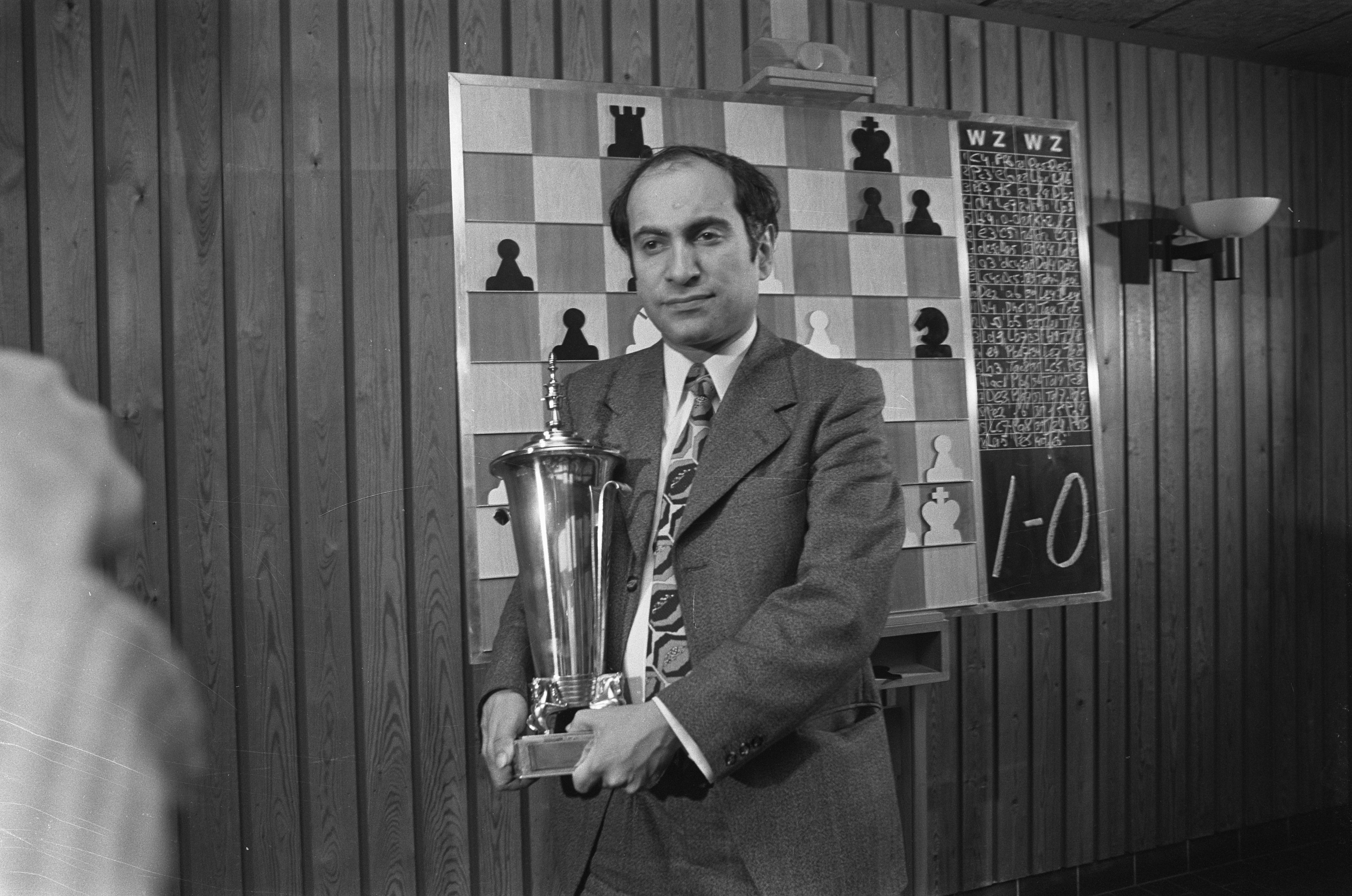 Collectie / Archief : Fotocollectie Anefo Reportage / Serie : [ onbekend ] Beschrijving : Hoogovenschaaktoernooi Wijk aan Zee , winnaar Tal met beker Datum : 3 februari 1973 Locatie : Noord-Holland, Wijk aan Zee Trefwoorden : Winnaars, bekers, schaken, toernooien Instellingsnaam : Hoogovenschaaktoernooi Fotograaf : Verhoeff, Bert / Anefo Auteursrechthebbende : Nationaal Archief Materiaalsoort : Negatief (zwart/wit) Nummer archiefinventaris : bekijk toegang 2.24.01.05 Bestanddeelnummer : 926-1980